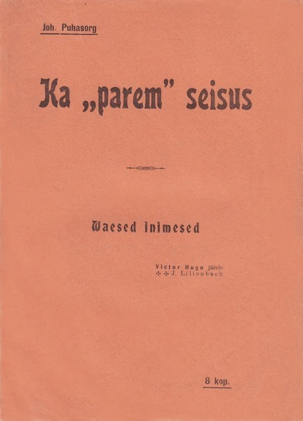 Raamatu "Ka parem seisus" esikaas